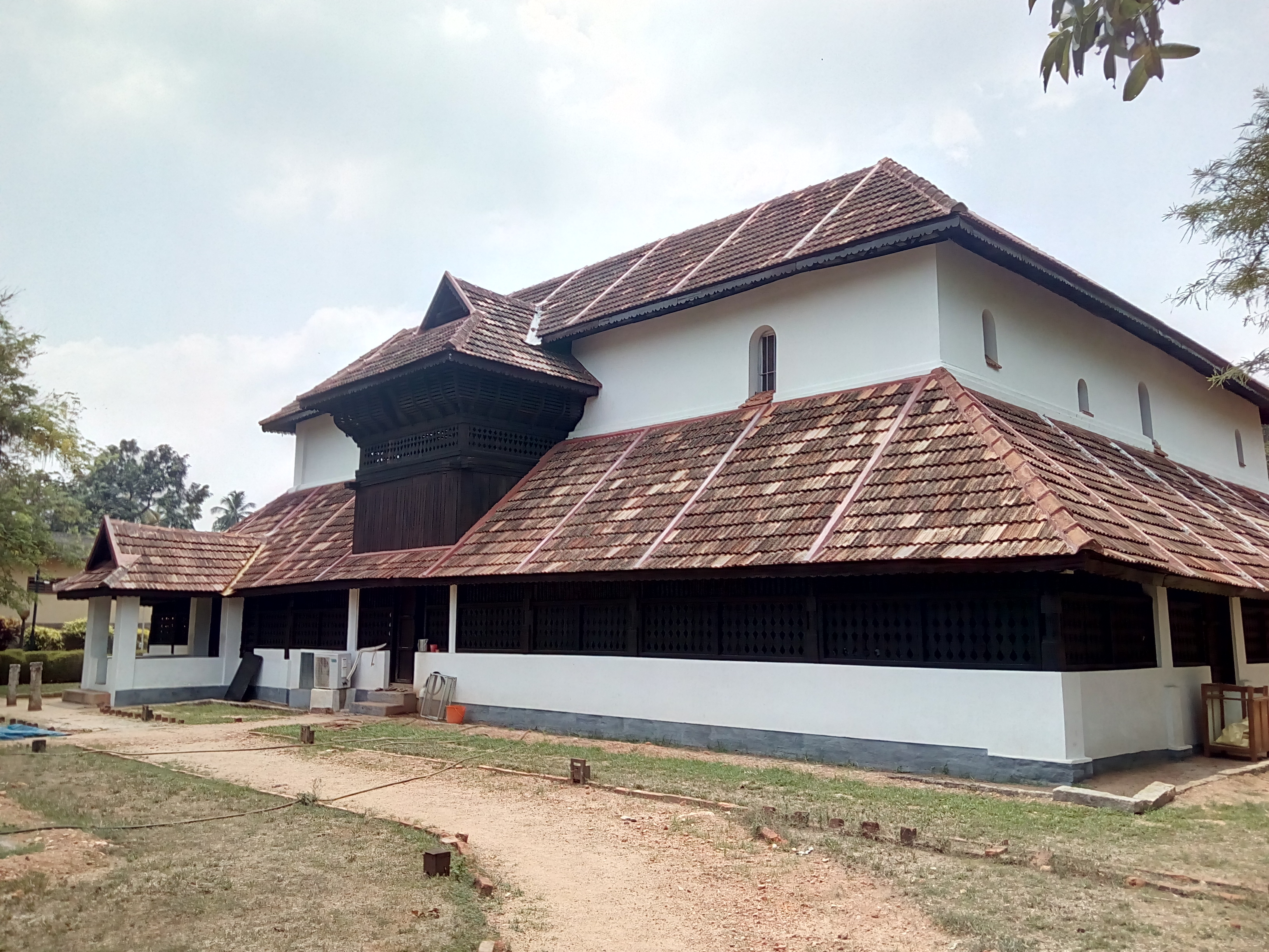 Koyikkal Palace Nedumangadu